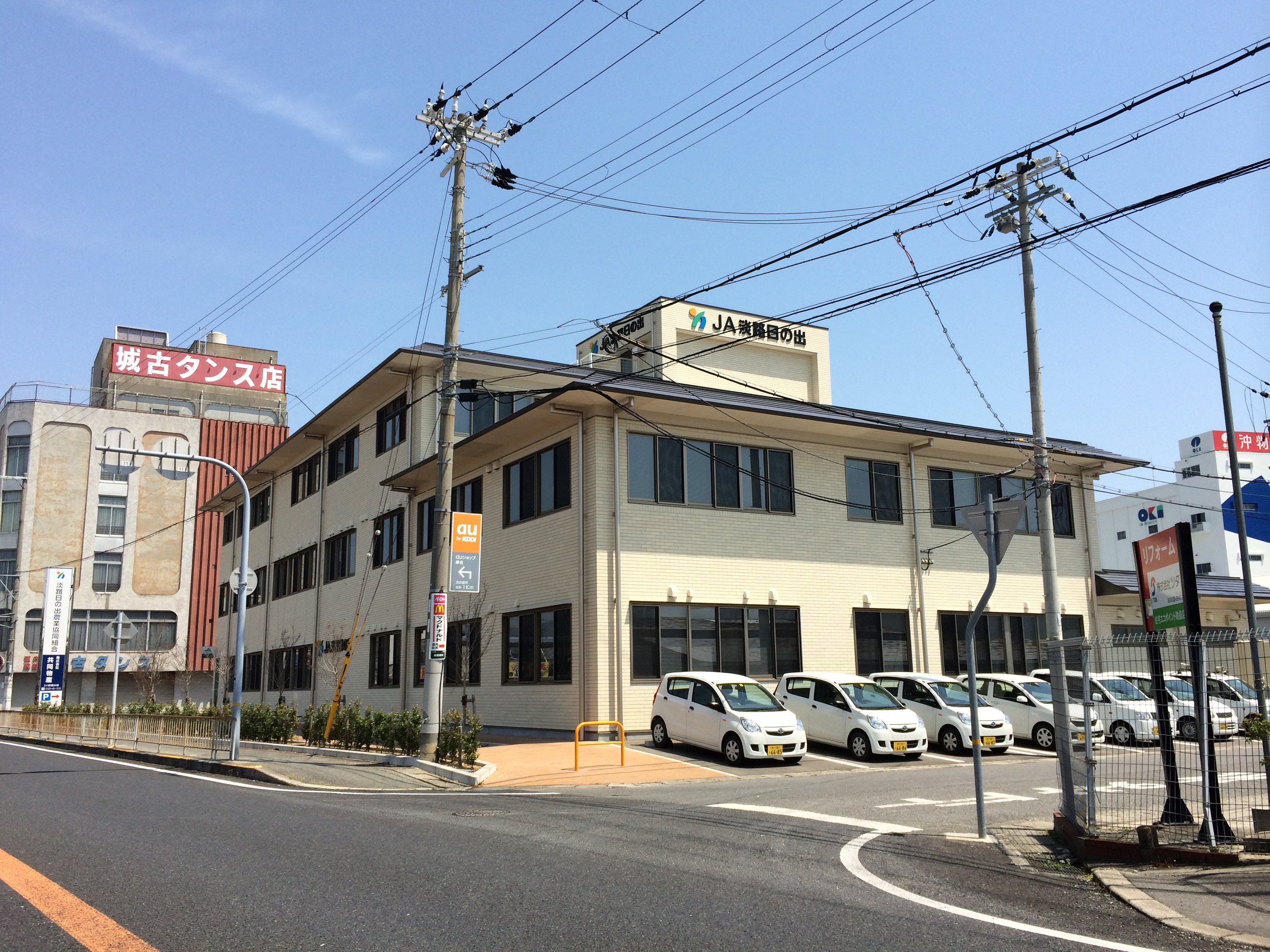 JA淡路日の出本店の外観